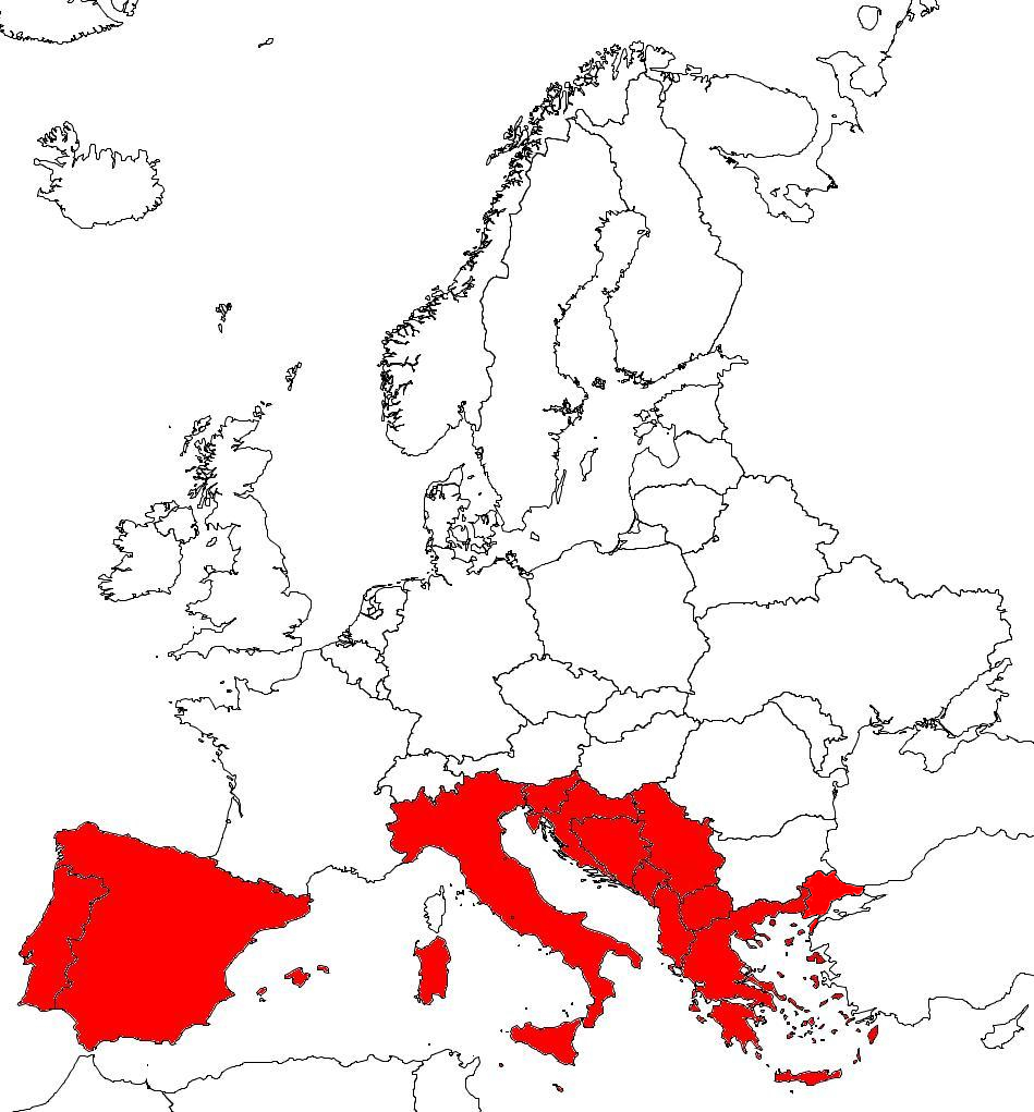 Europe du Sud, selon la classification de l'ONU.